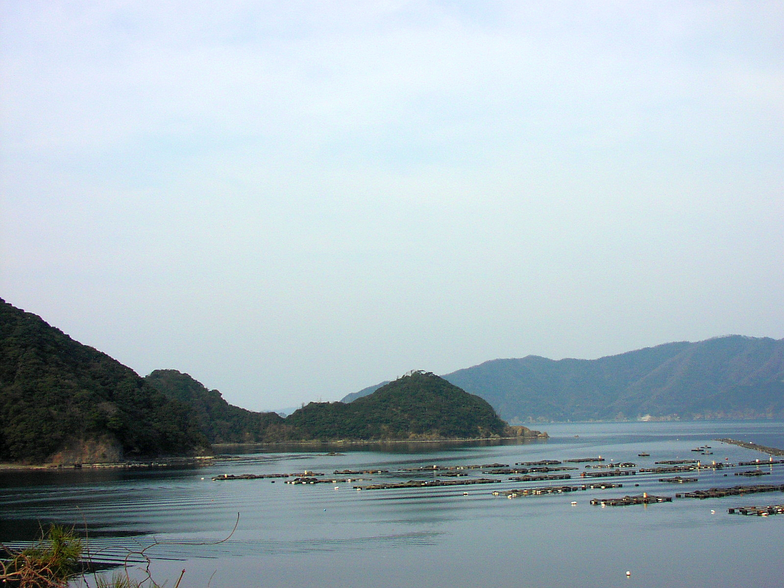 阿納から見た矢代湾。